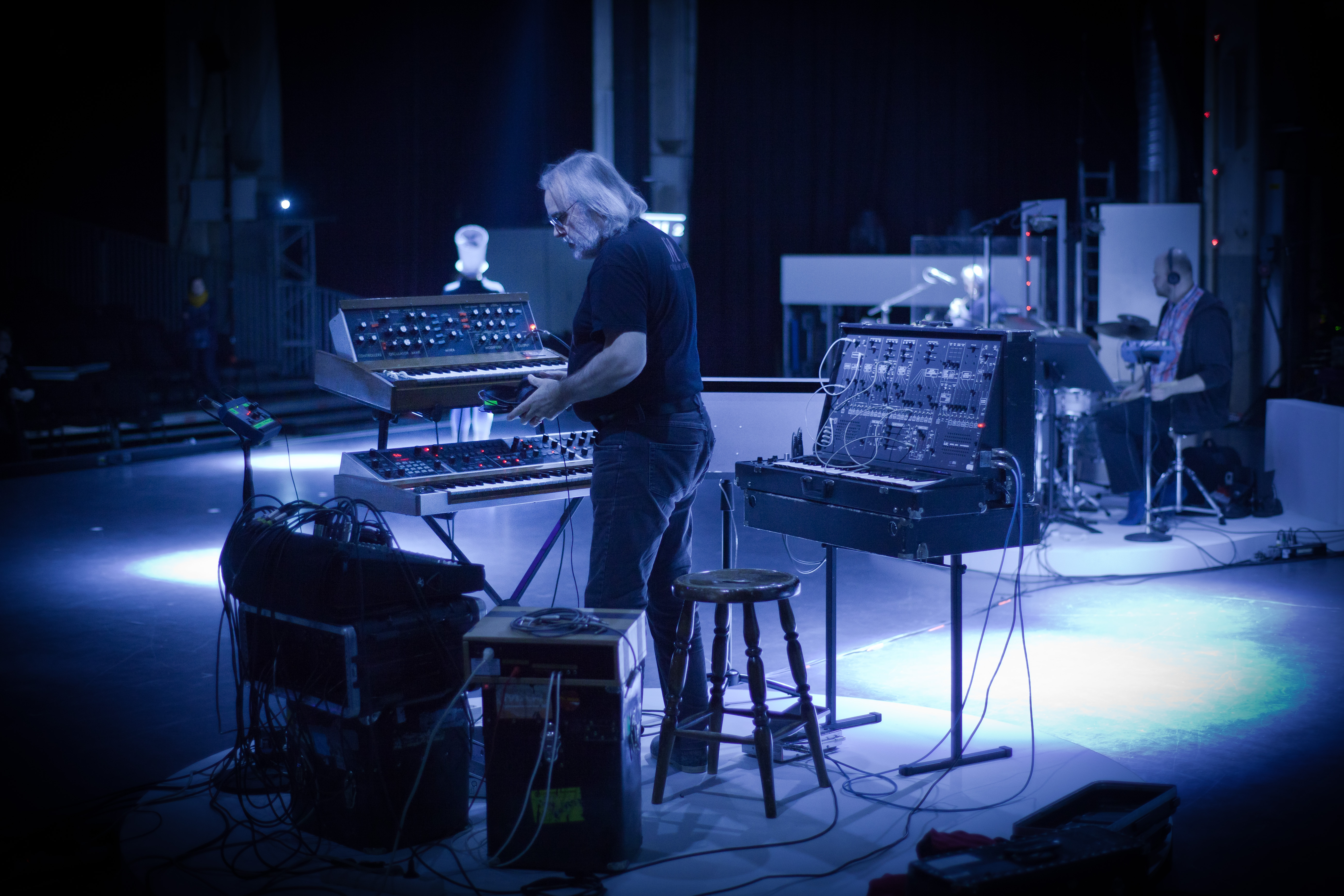 Memorymoog, Minimoog & Arp 2600 Energo 2011 making of